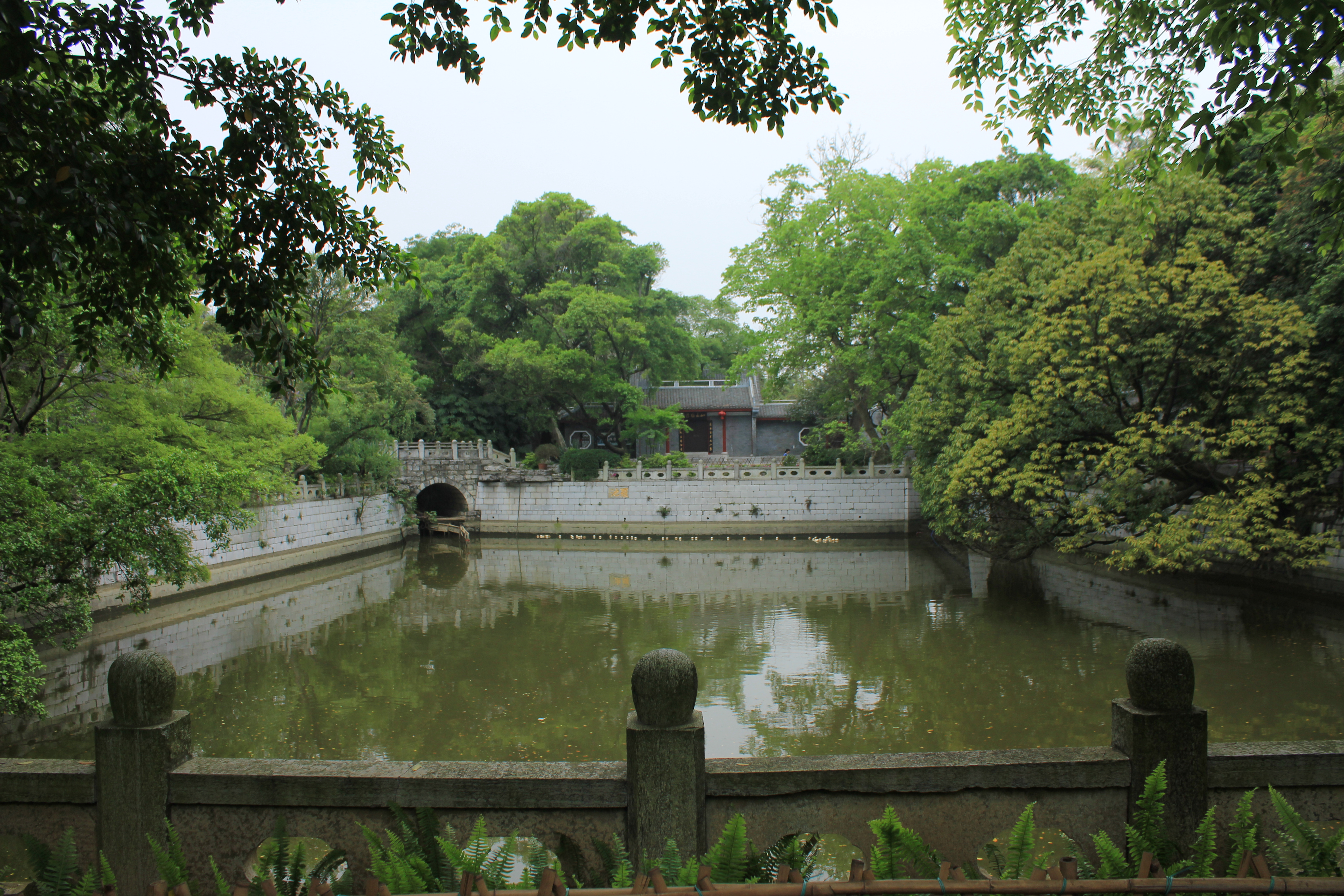 柳侯公园罗池